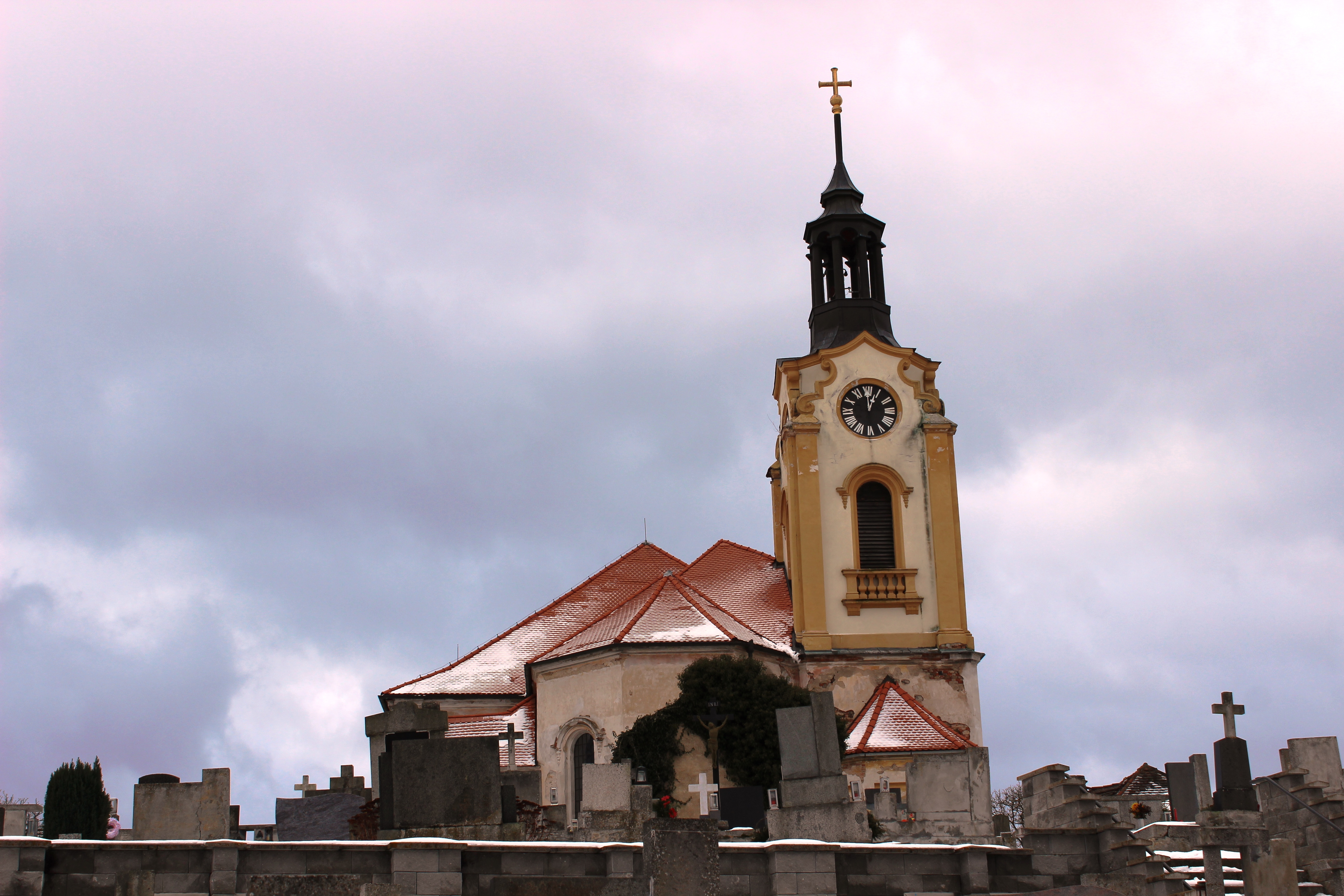 Kostel svatého Jana Křtitele. Vřeskovice - okres Klatovy, Plzeňský kraj,Česká republika.